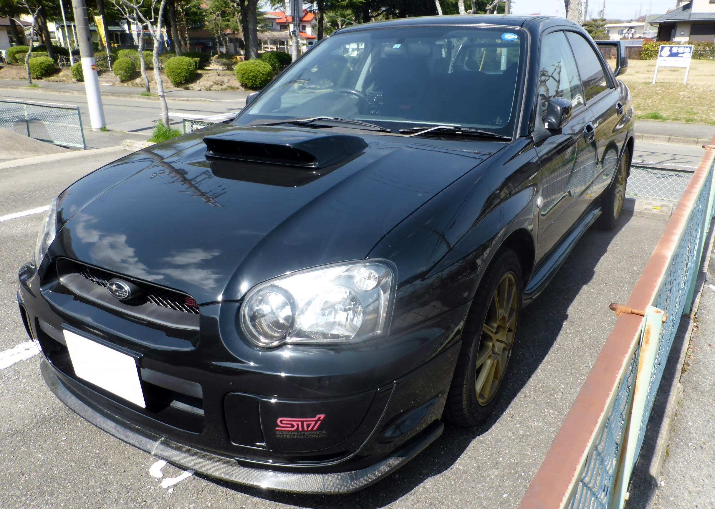 黒いGDB型スバル・インプレッサWRX STiをフロントから撮影。